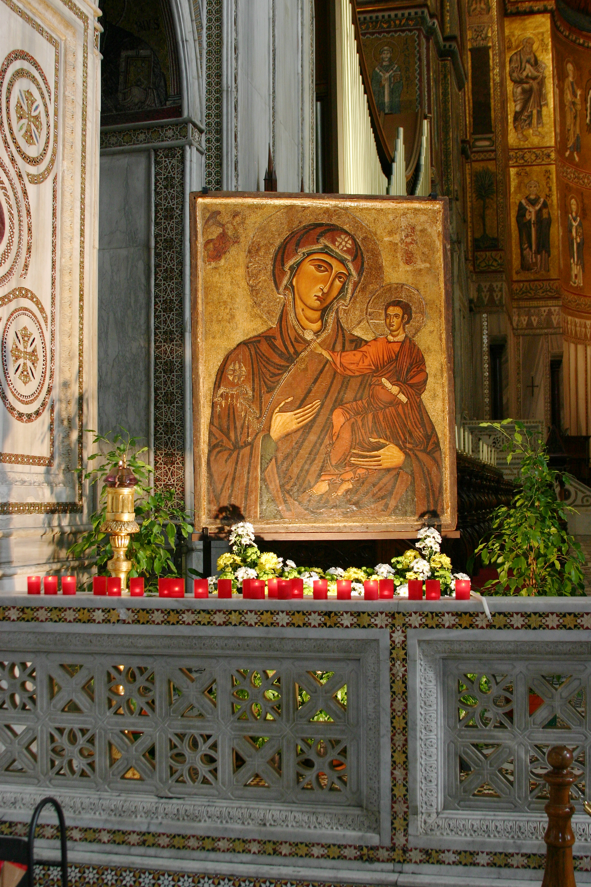 Cathedral of Monreale